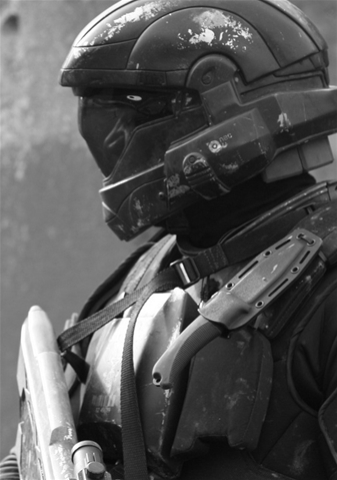 este es uno de los ODST es un soldado sin modificaciones corporales.